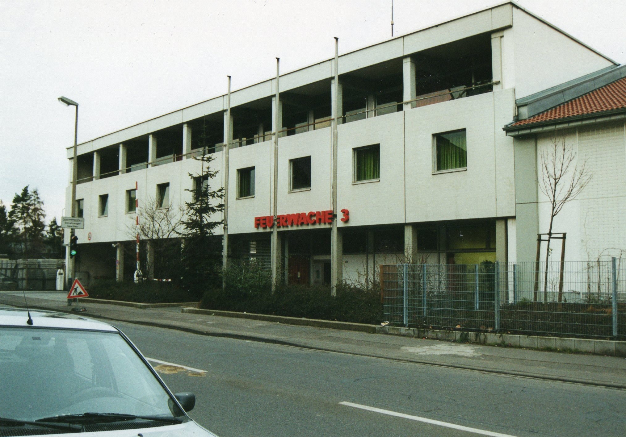 Feuerwache 3, Friesdorfer Straße 160, Bad Godesberg (Ortsteil Godesberg-Nord)